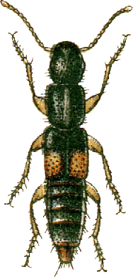 This file has been extracted from another file: Jacobs14.jpg